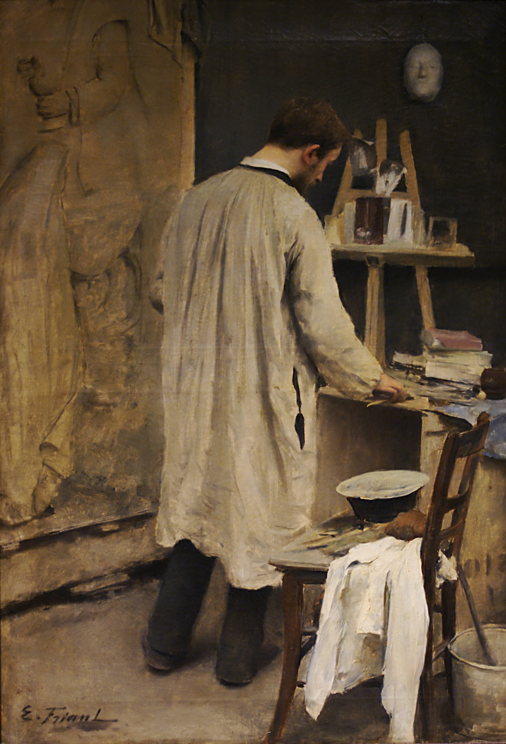 portrait du sculpteur Ernest Bussière (1863 - 1913) par Émile Friant (1863 – 1932), collection musée des Beaux-Arts de Nancy